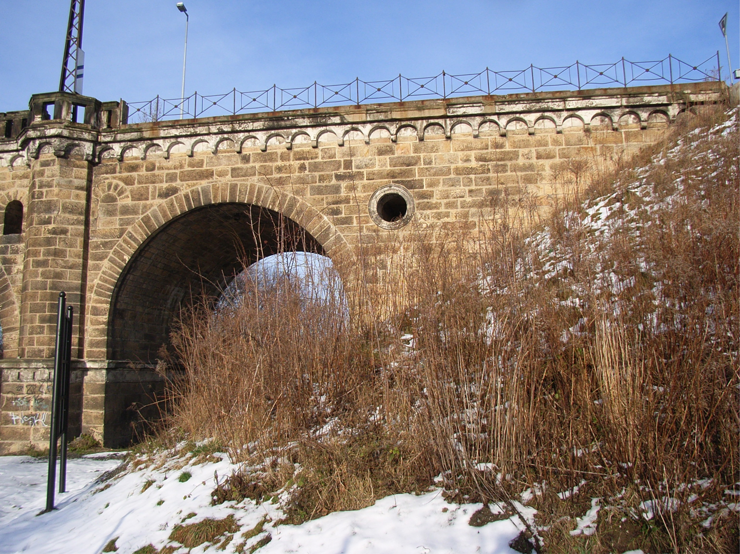 Das Neißeviadukt auf heute polnischer Seite der Neiße (originaler Zustand der Erbauung), Blick auf das östliche Widerlager